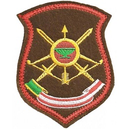 35-я ракетная Краснознамённая, орденов Кутузова и Александра Невского дивизия РВСН